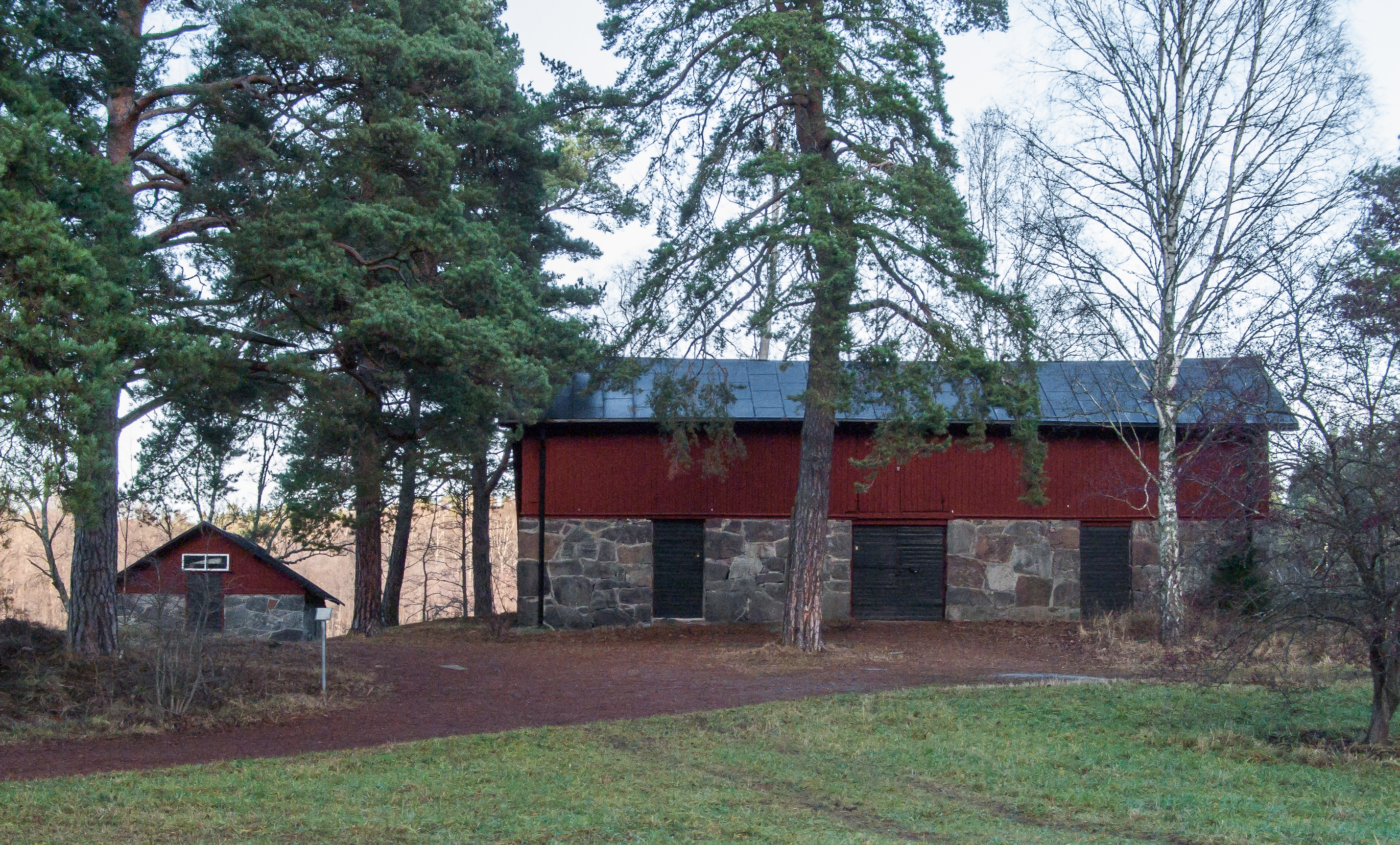 Finedal, Lidingö. "Labbet".